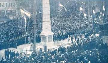 De Naald in Apeldoorn bij de opening in 1901.